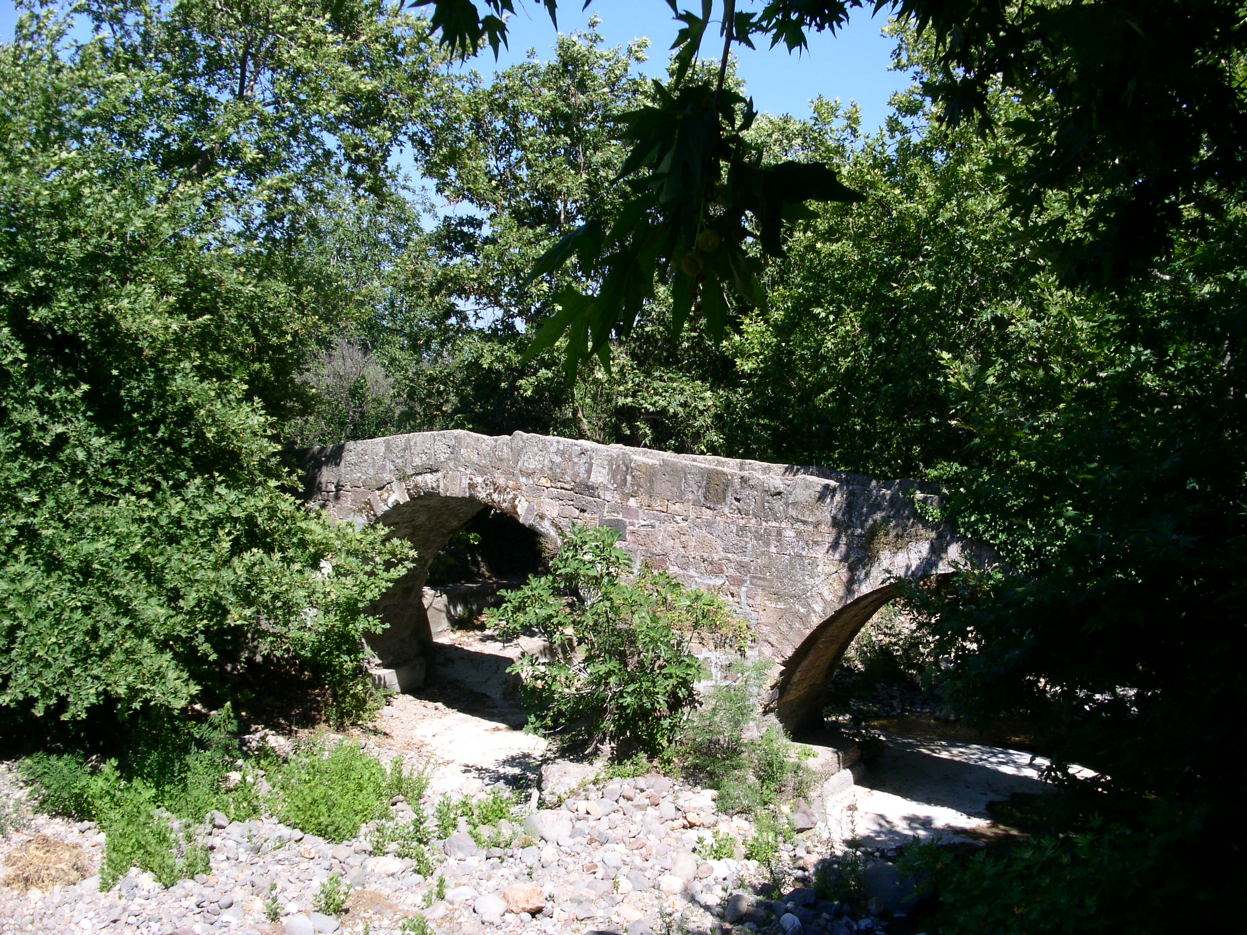 Old bridge in Paraklia, Lesbos, Greece